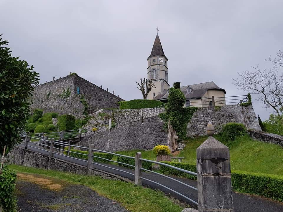 L'église Saint-Polycarpe de Castet.